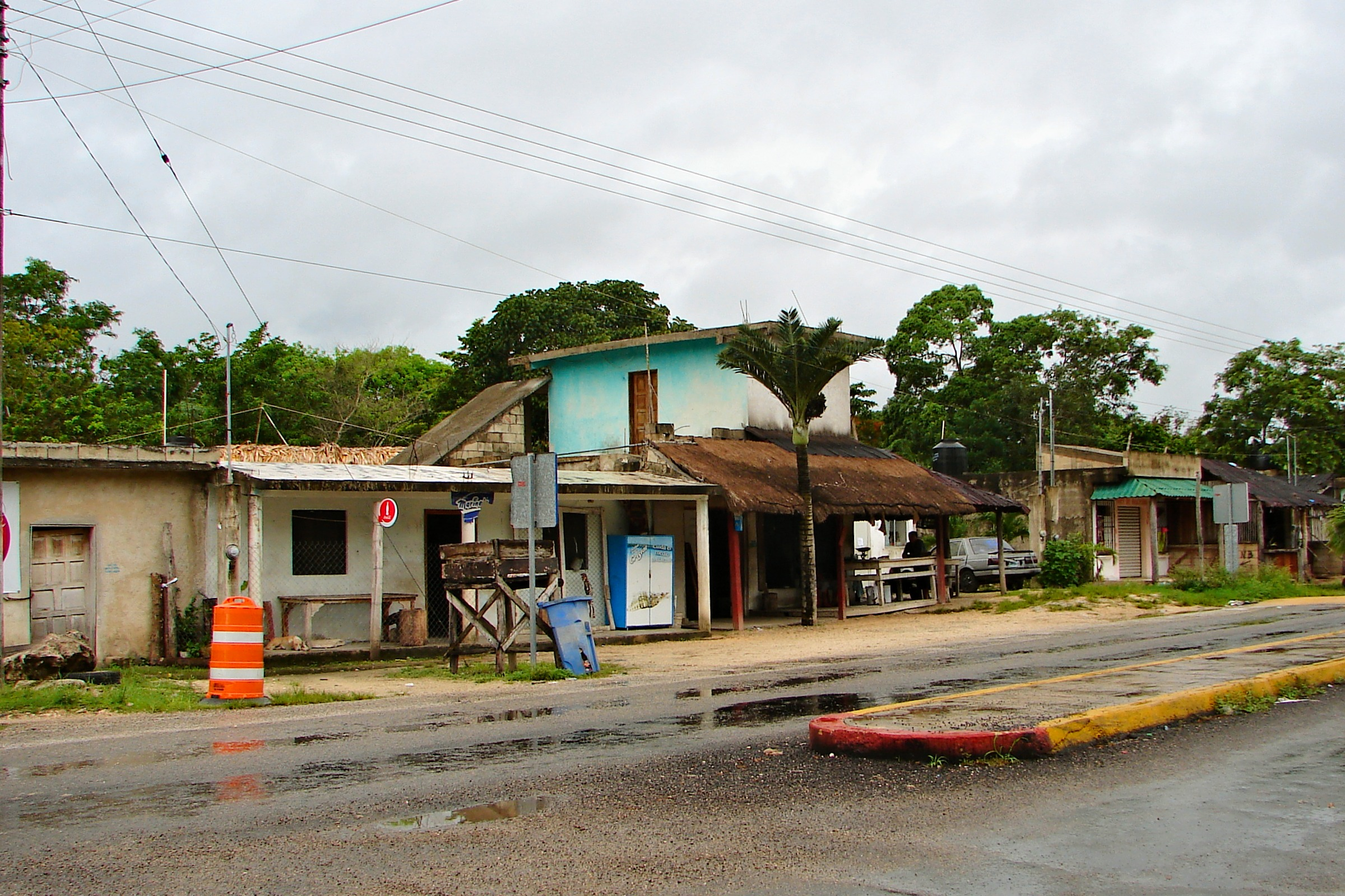 Macario Gomez (Tulum Municipality), Quintana Roo, Mexico